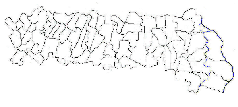 Harta judeţului Ialomiţa